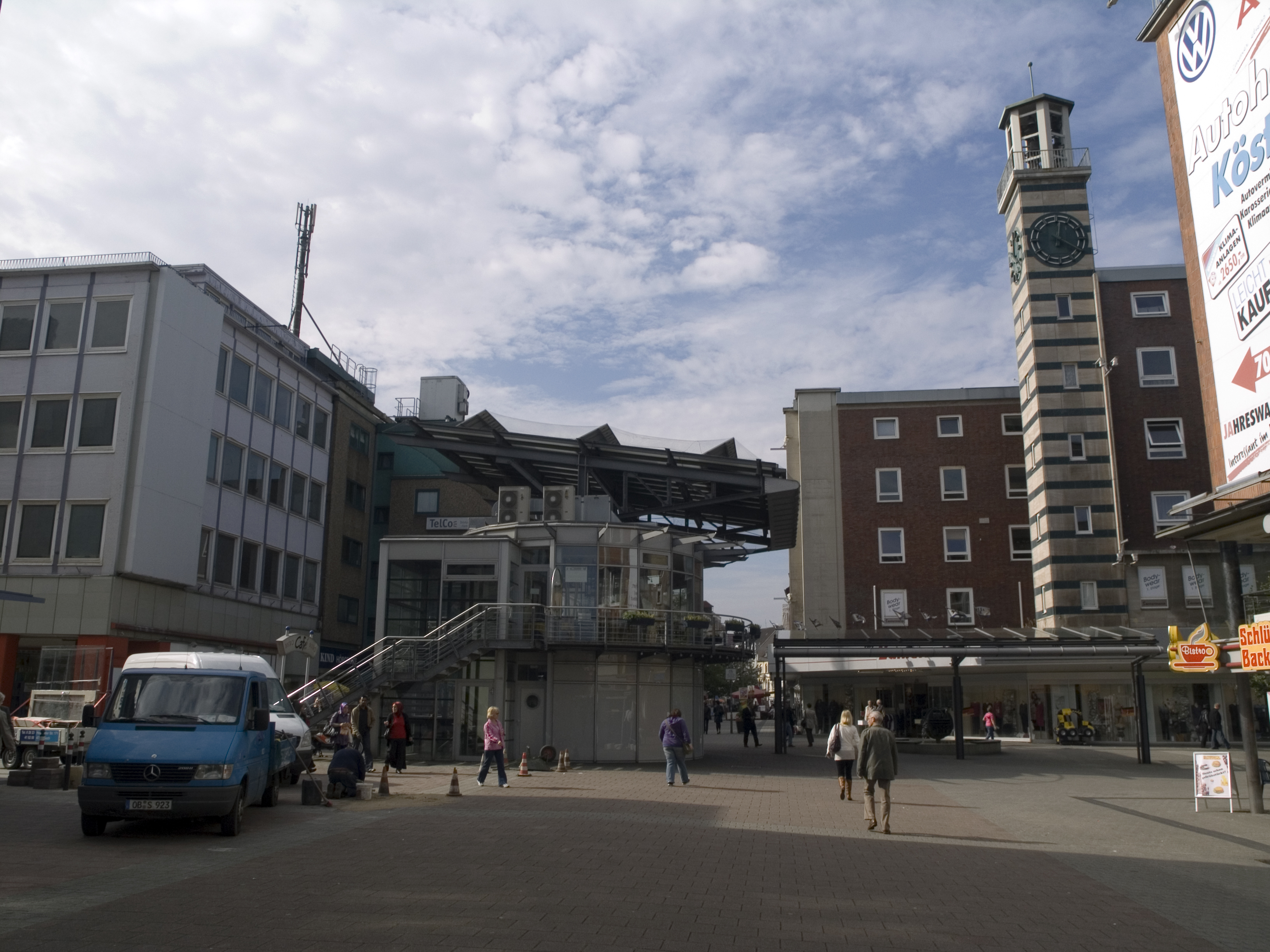 Северный Рейн - Вестфалия, Оберхаузен, Штеркраде - Bahnhofstrasse